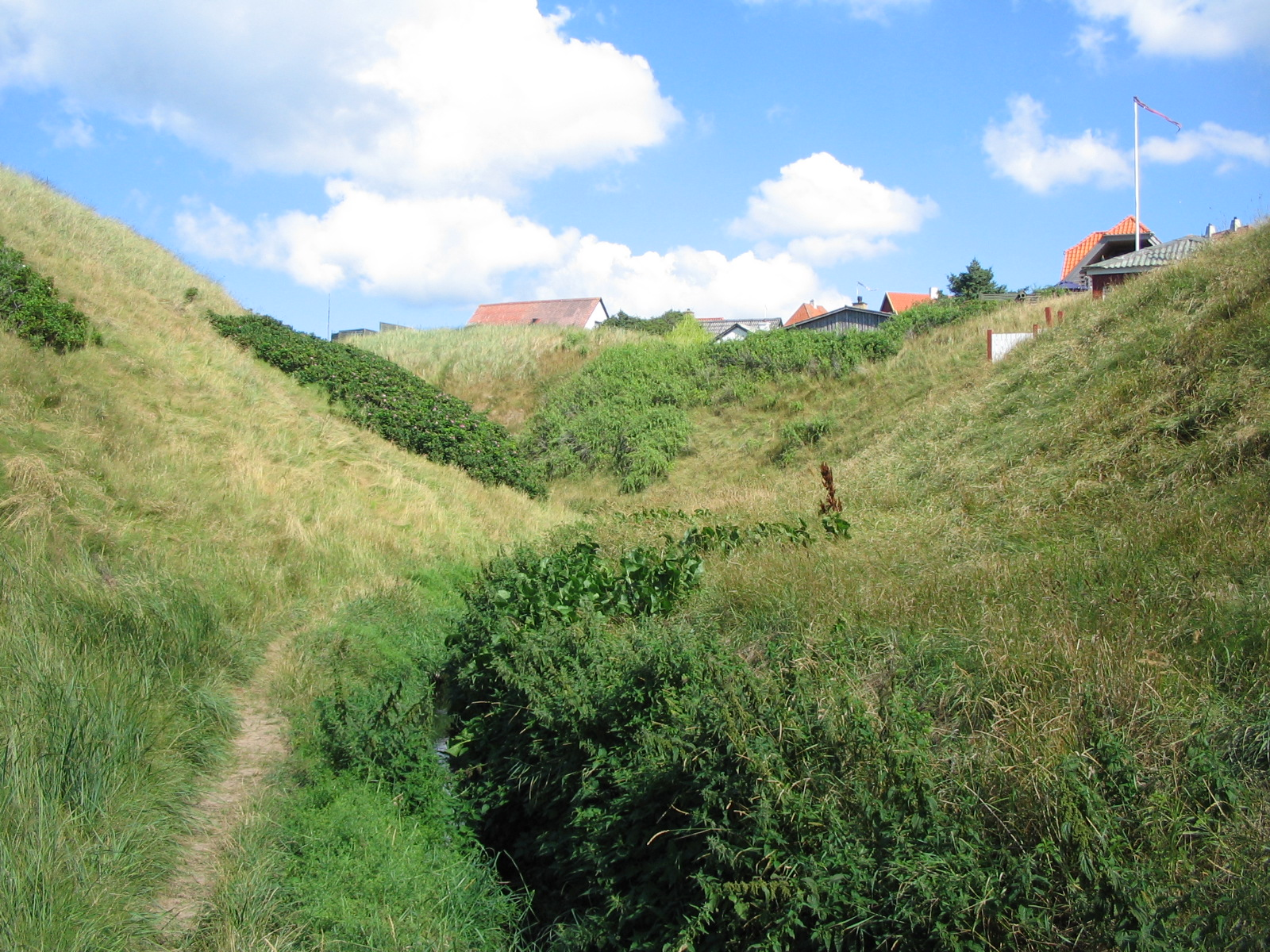 Kløften i Lønstrup som oprindelig var Lønstrup Bæk, blev dannet under skybruddet i 1877